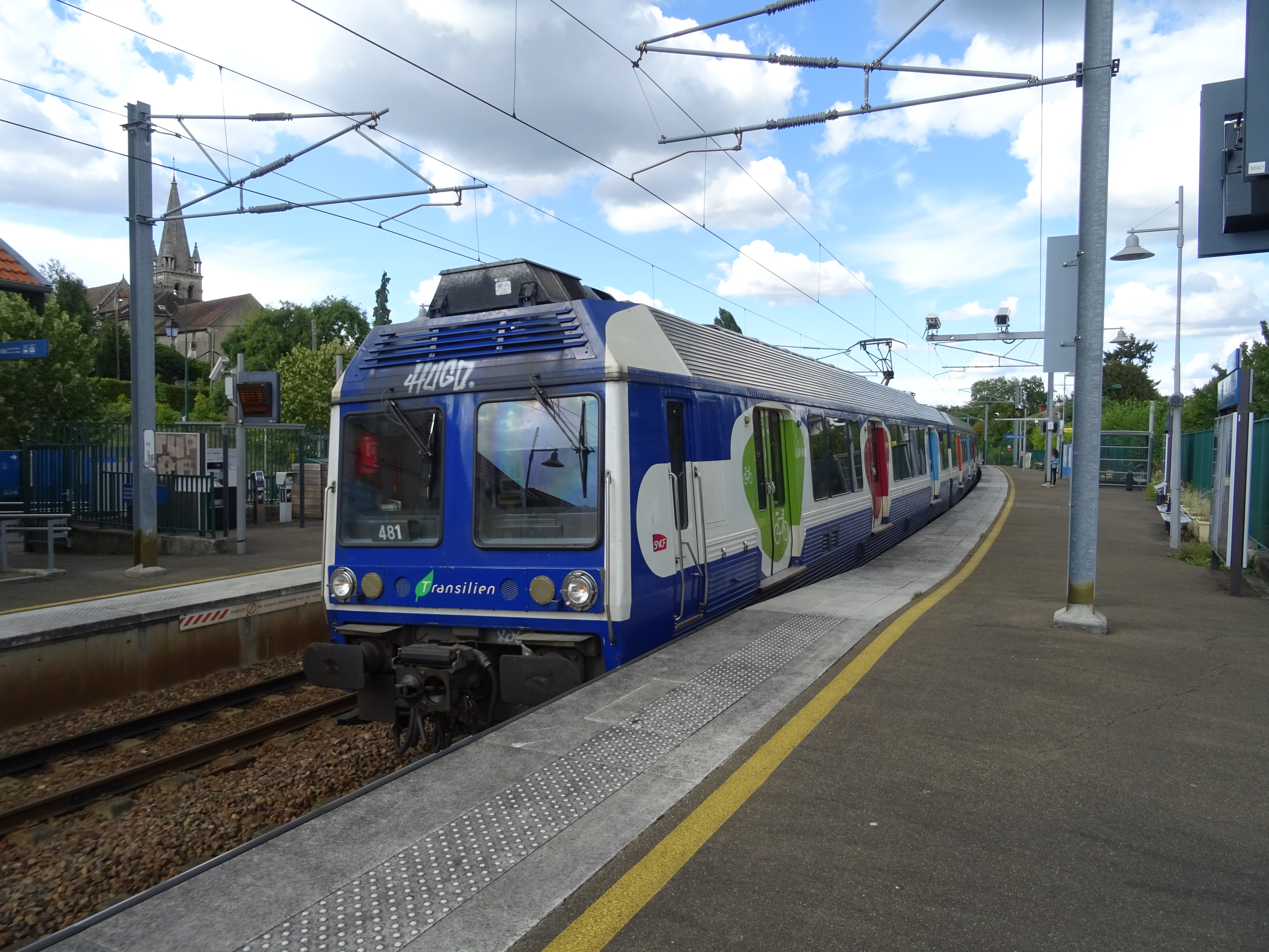 Z 6400 Transilien à quai à Mareil-Marly